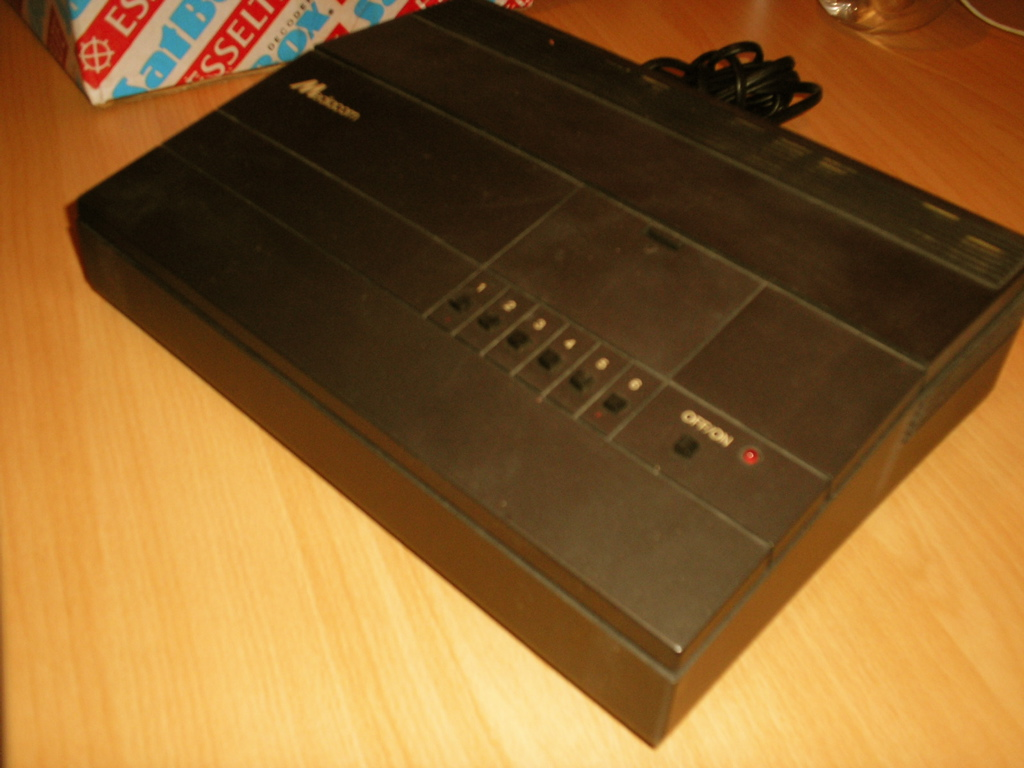 Ik heb deze foto zelf gemaakt.